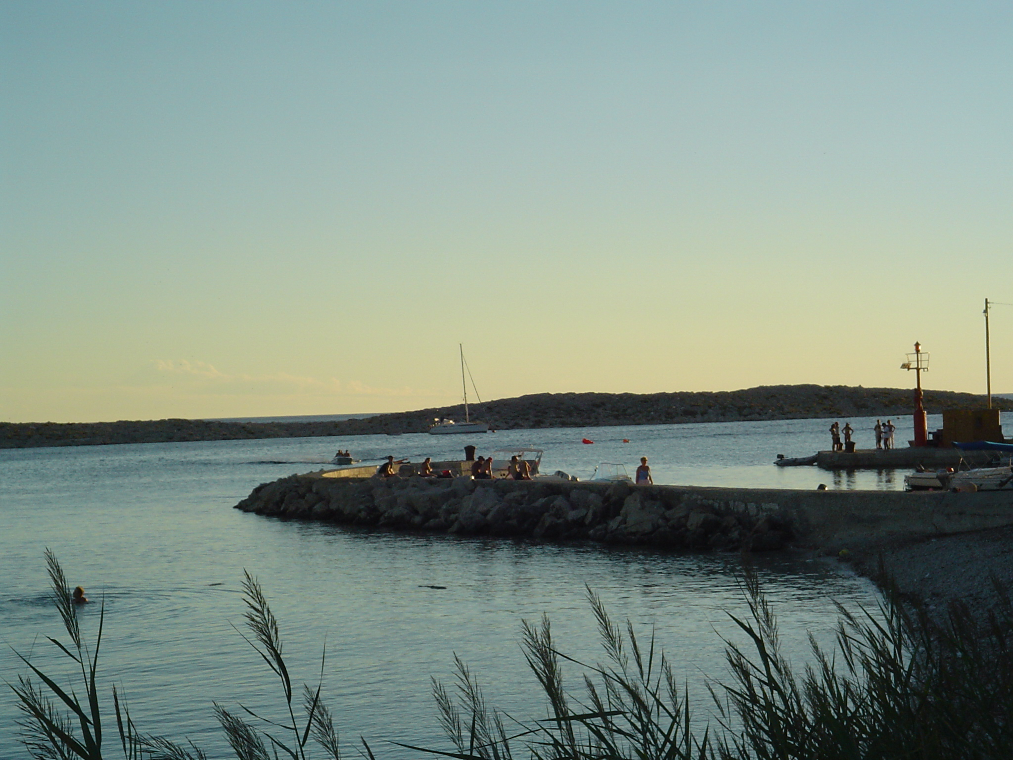 Der Hafen Krijal auf der südwestlichen Seite der Insel Premuda